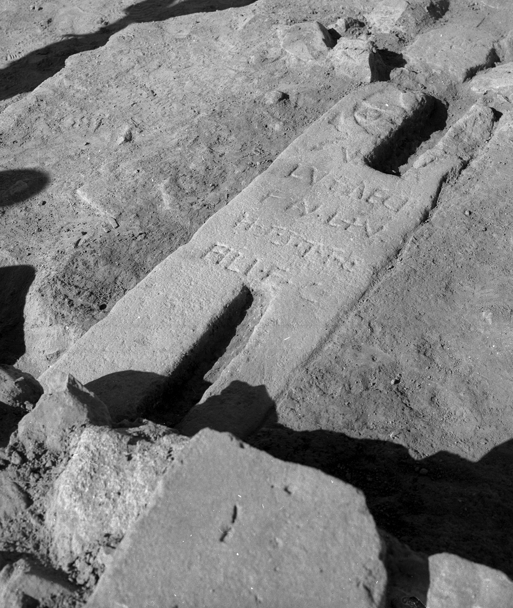 Estela funeraria